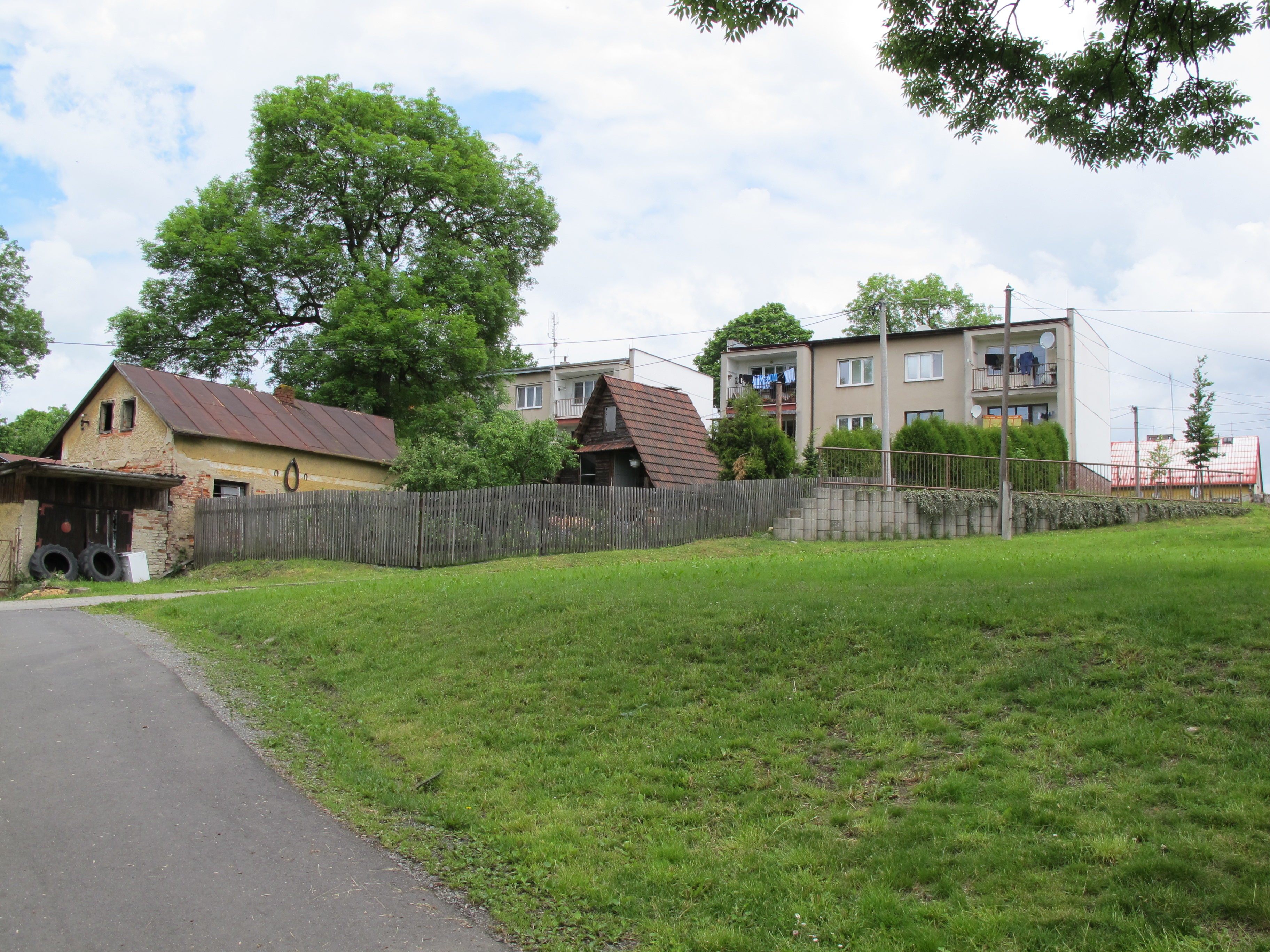 Stará Voda, okres Cheb - zástavba. This image was acquired during the event Wikiměsto Mariánské Lázně.